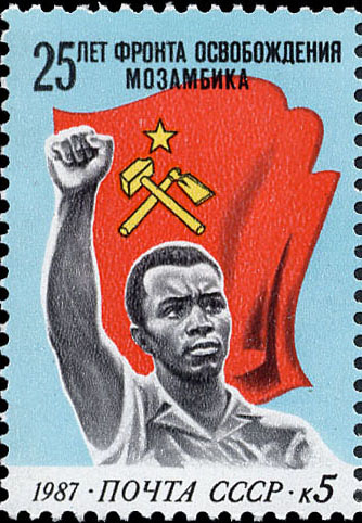 Почтовая марка СССР, выпущенная 25 июня 1987 года и посвящённая 25-летию Фронта освобождения Мозамбика (Фрелимо). На марке изображён негритянский молодой человек и флаг Партии Фрелимо. Художник — Ю. Бронфенбренер. Номер (ЦФА) — 5844. Тираж — 2,0 млн экз.